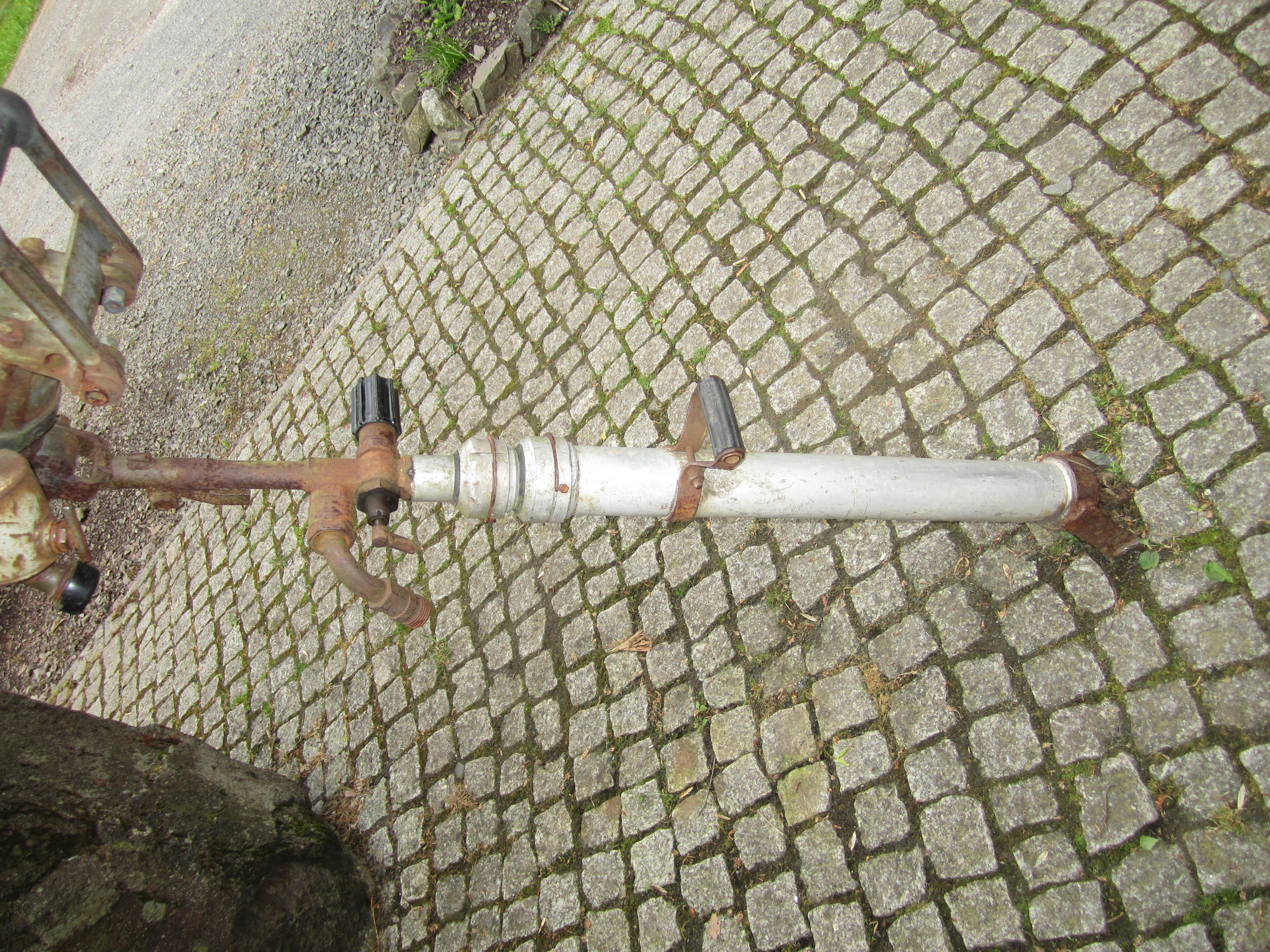 Druckluftteleskopbohrstütze im Besucherbergwerk Rabensteiner Stollen. Netzkater, Thüringen, Deutschland.